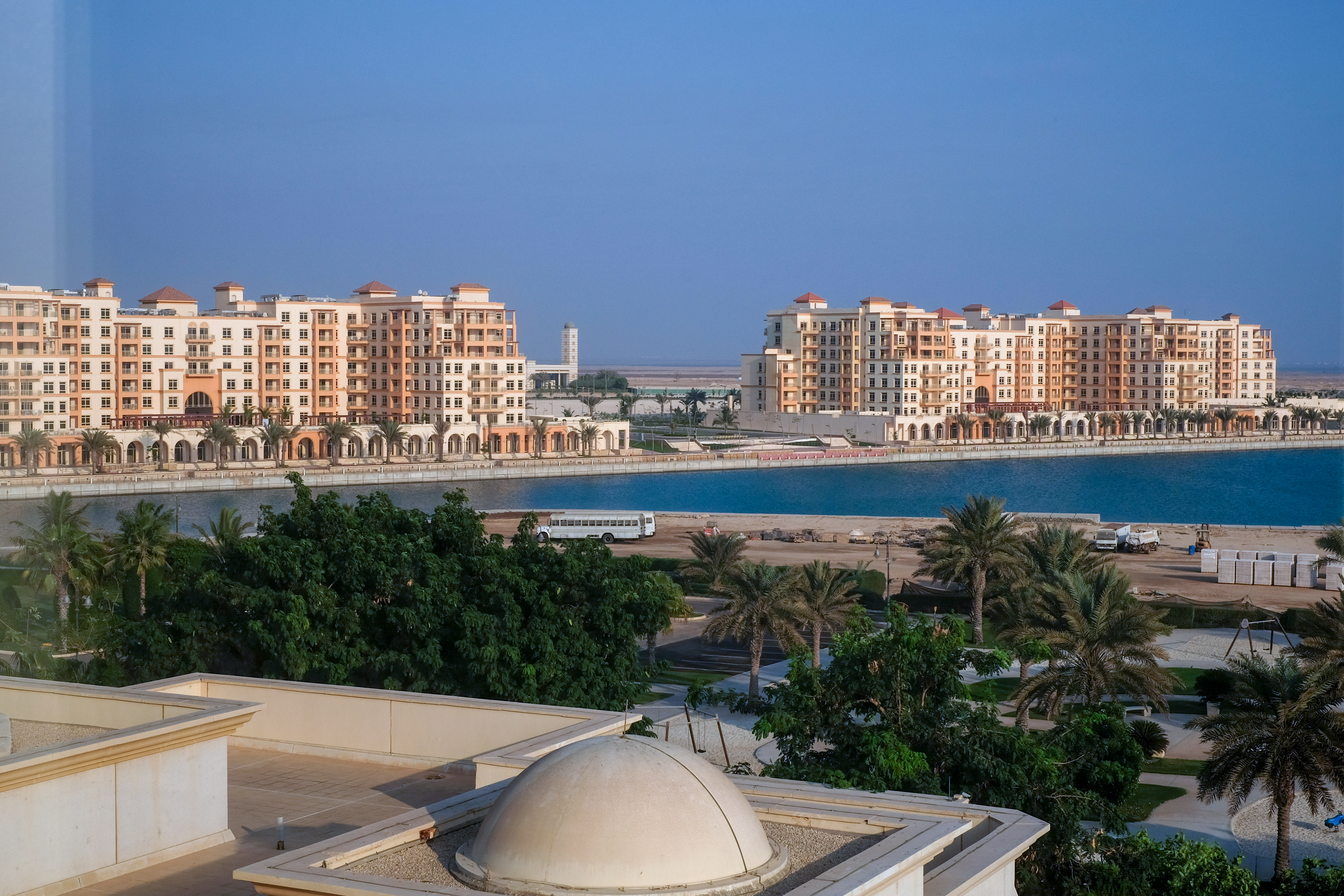 The Waterfront of the King Abdullah Economic City as of October 2016